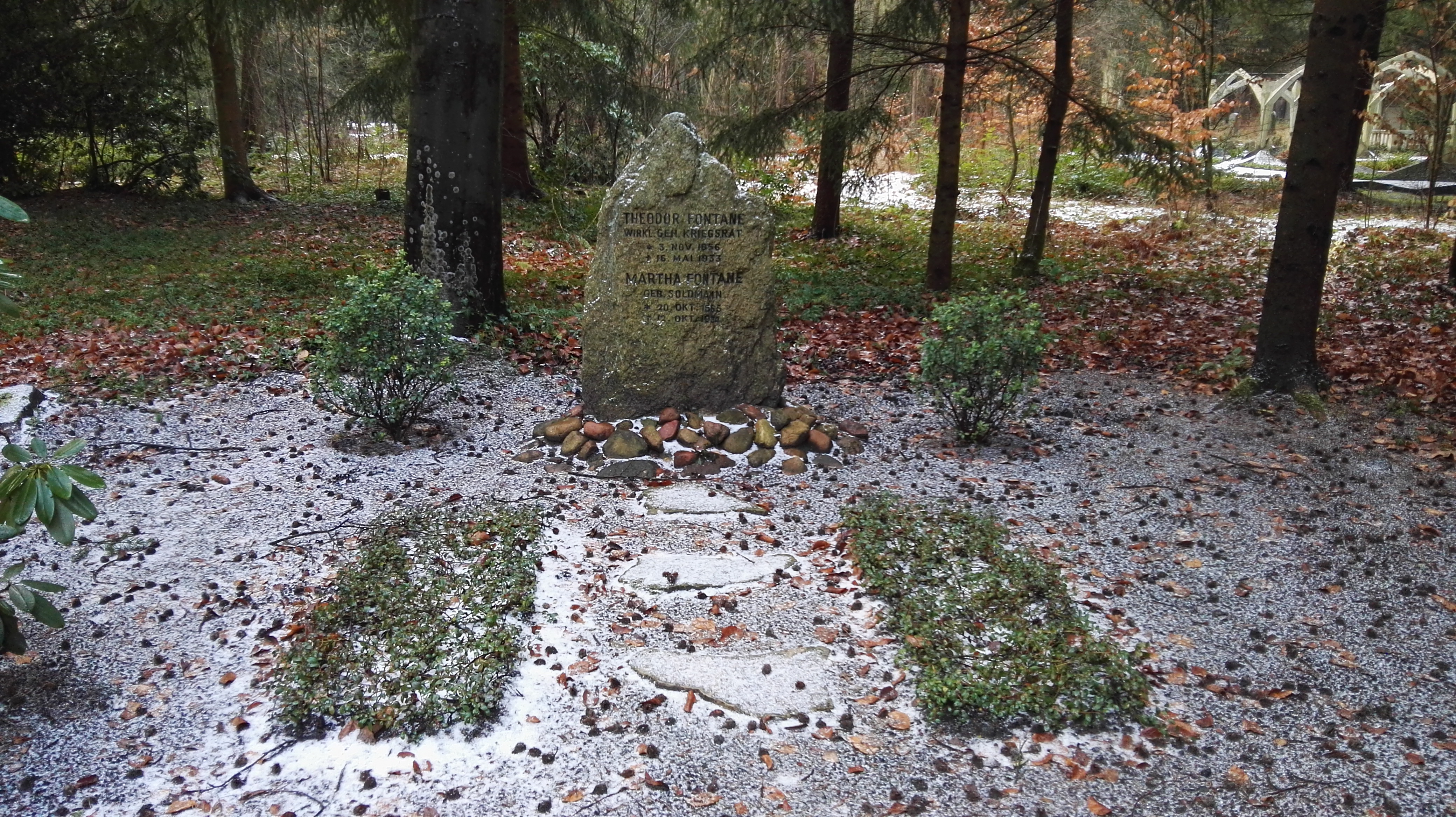 Grab von Theodor Fontane jun. auf dem Südwestkirchhof Stahnsdorf